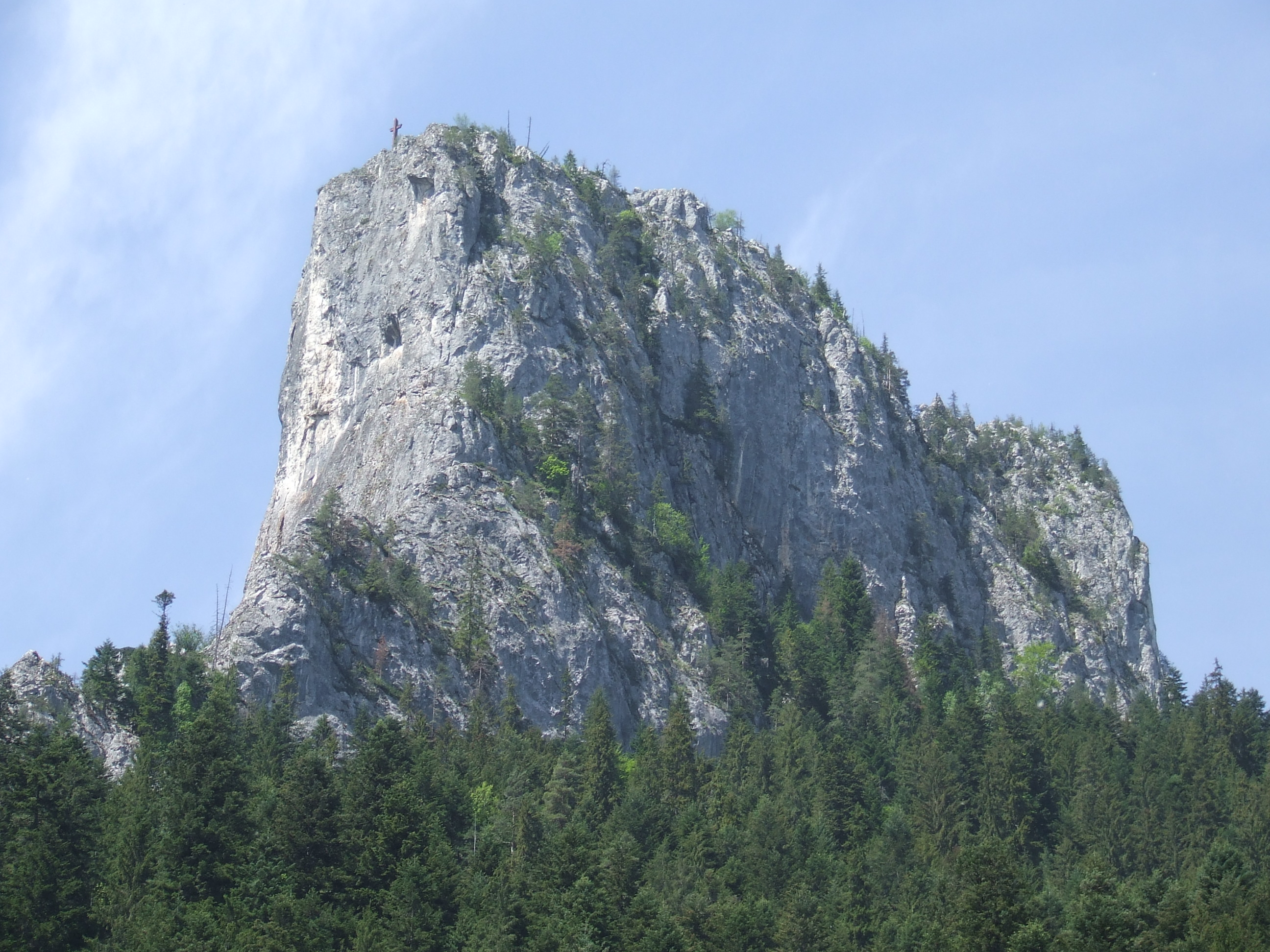 Erdély, Békás-szoros